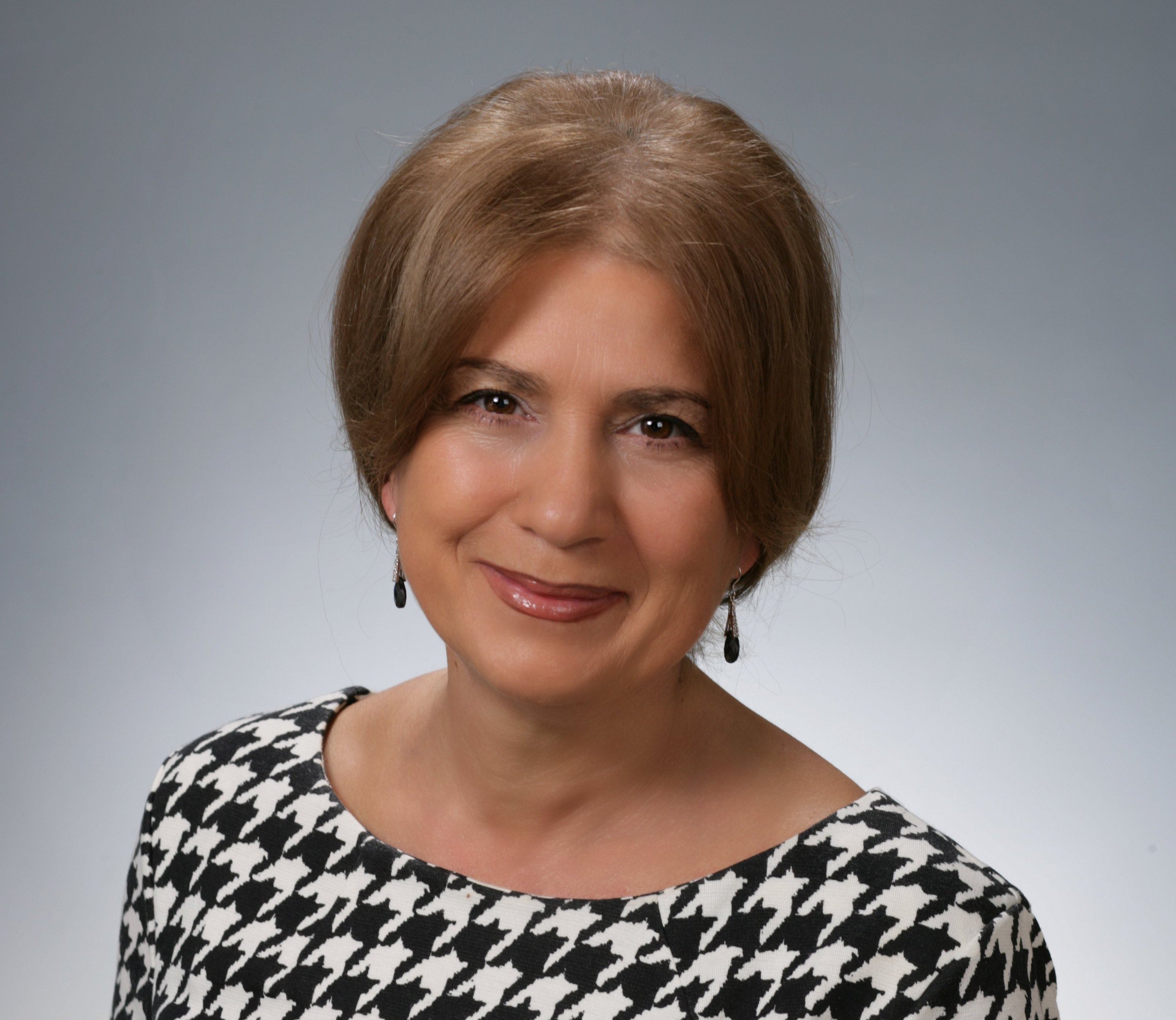 პროფესორი მანანა თანდაშვილი